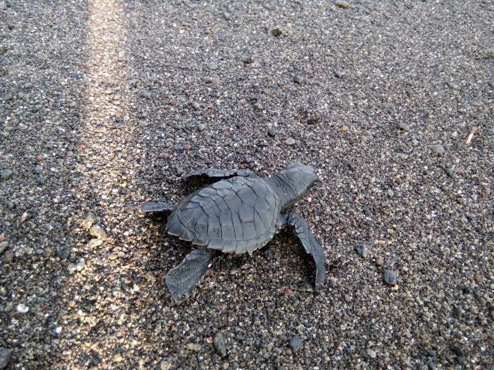 Tukik Penyu Hijau yang sudah kuat berenang dilepaskan kembali ke laut lepas. Balai Konservasi Penyu Hijau di Pantai Goa Cemara setidaknya melepas seribuan ekor tukik dalam satu periode migrasi penyu.